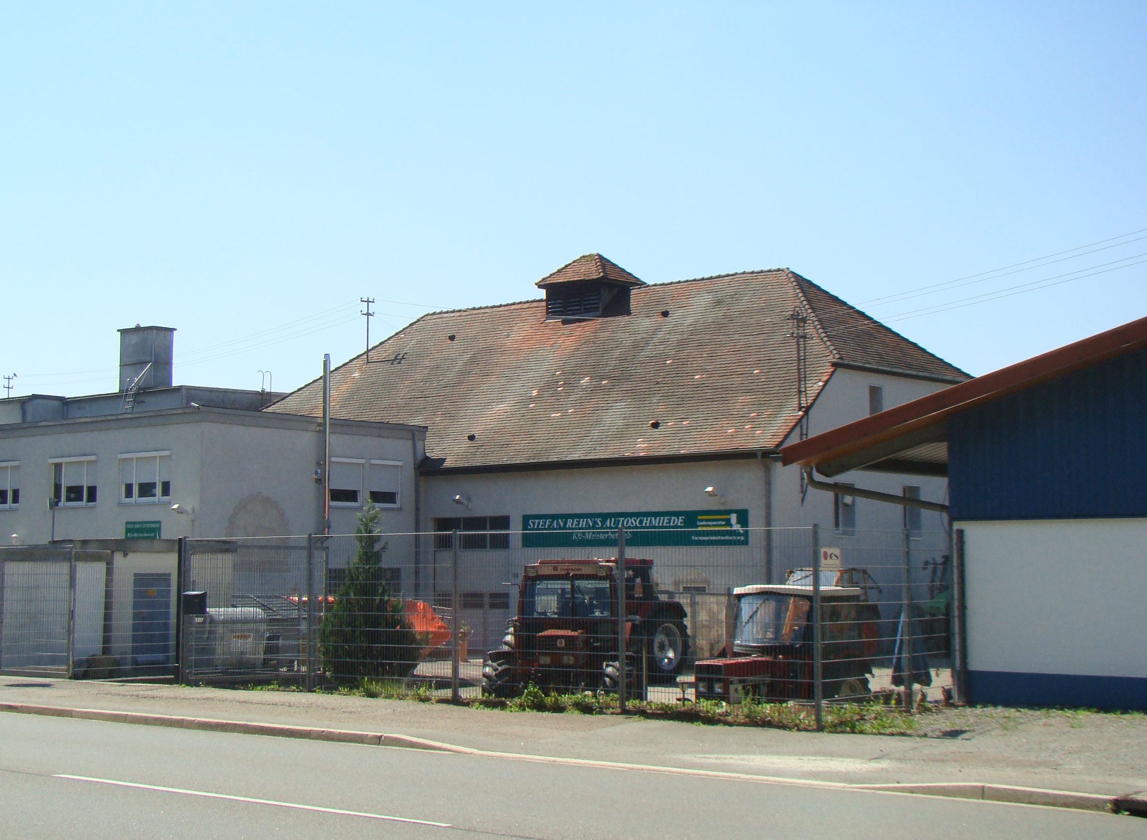 Steinbacher Mühler bei Neckarzimmern